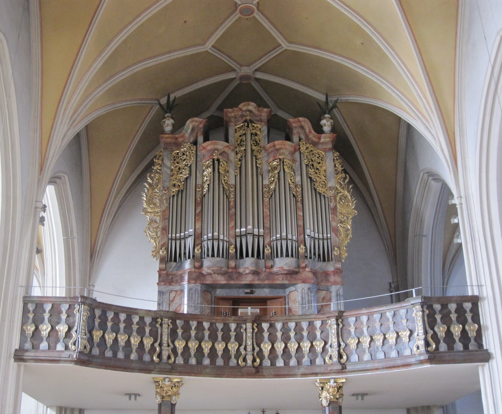 Orgel der Wallfahrtskirche Bogenberg